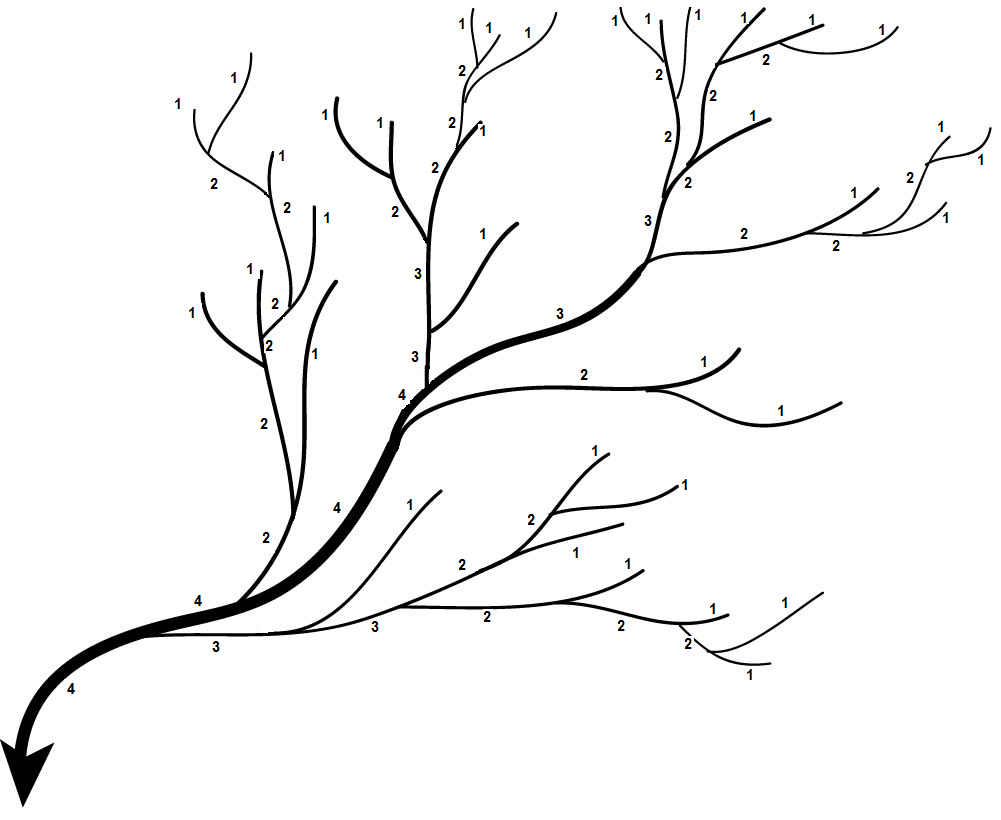 Croquis ilustrativo de la definición de "orden" de un río, ytabajado sobre la base del archivo: File:Dendritic Drainage pattern.jpg de Common